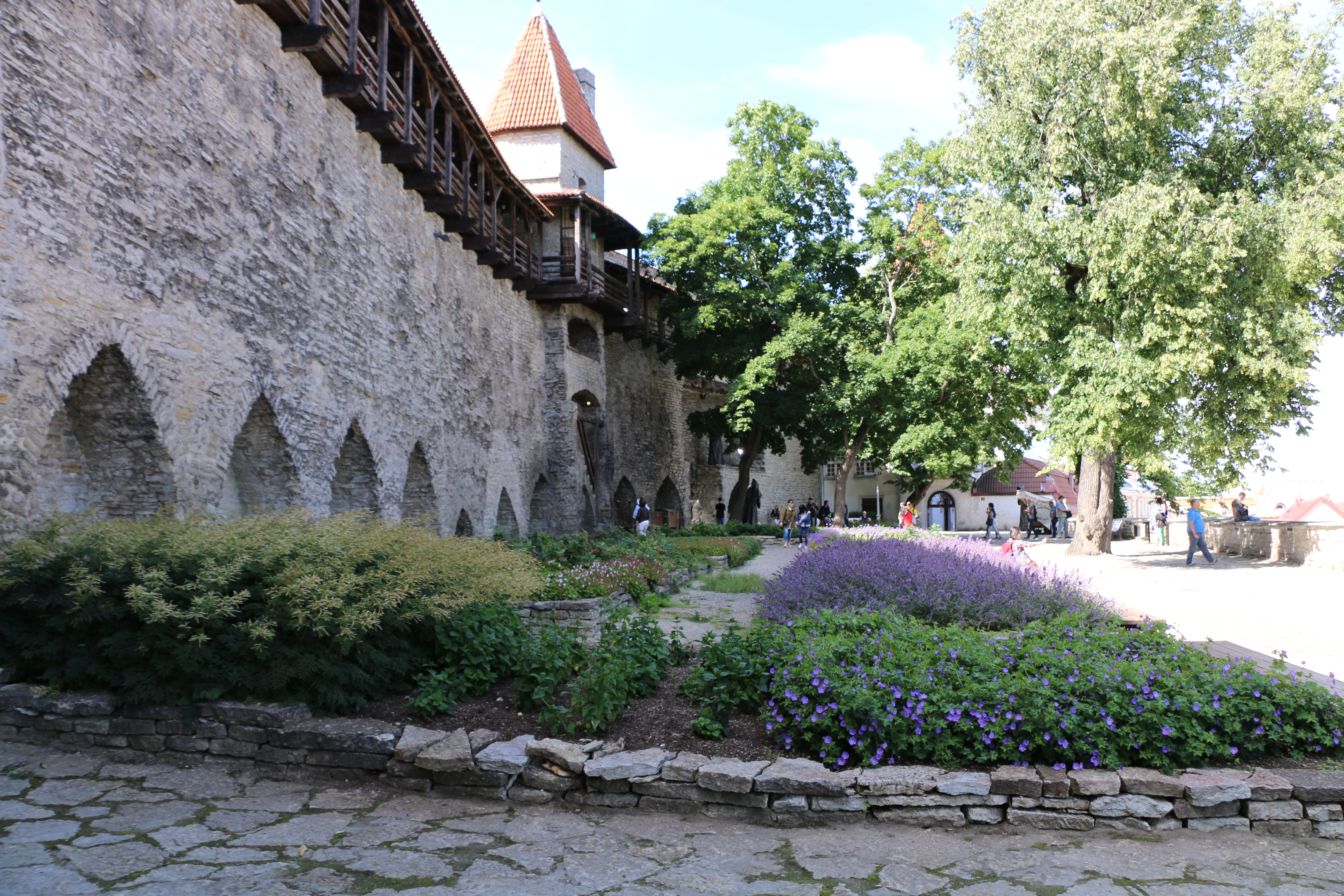 Taani kuninga aiad